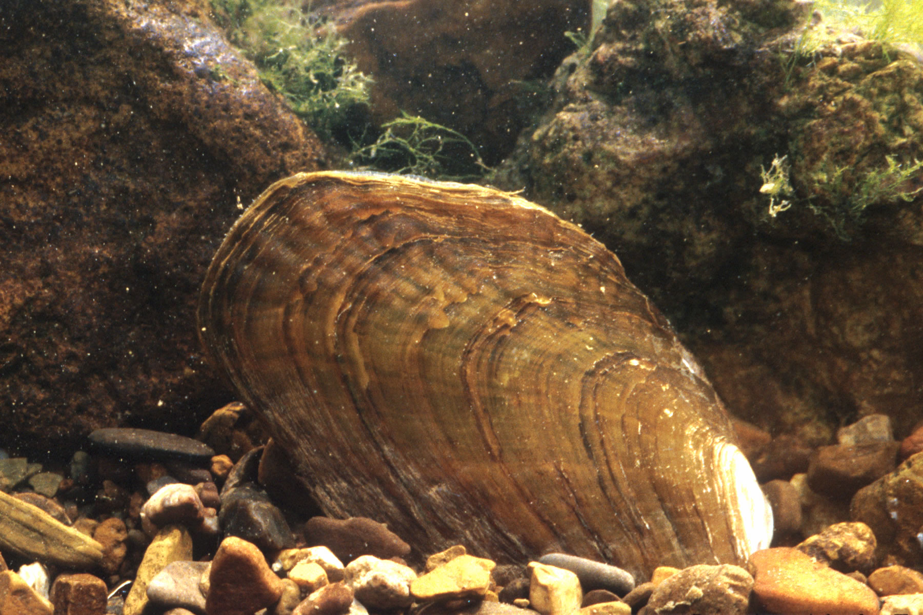 Lasmigona costata